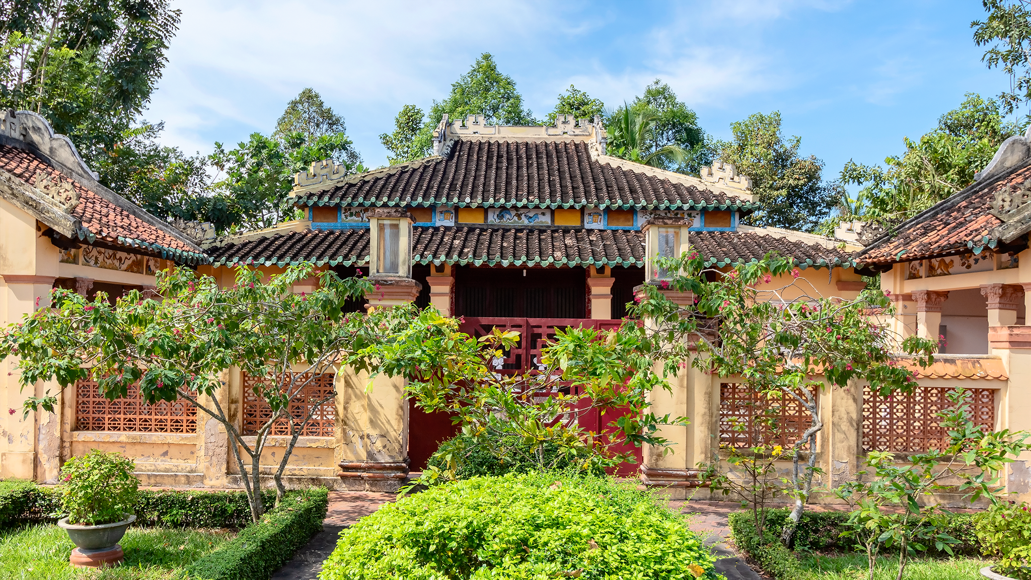 Điện Đại Thành trong Văn Thánh Miếu Vĩnh Long, tọa lạc tại thành phố Vĩnh Long, tỉnh Vĩnh Long, Việt Nam.